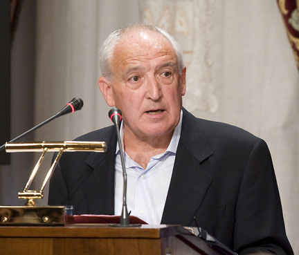 Anjel Lertxundi idazlea.